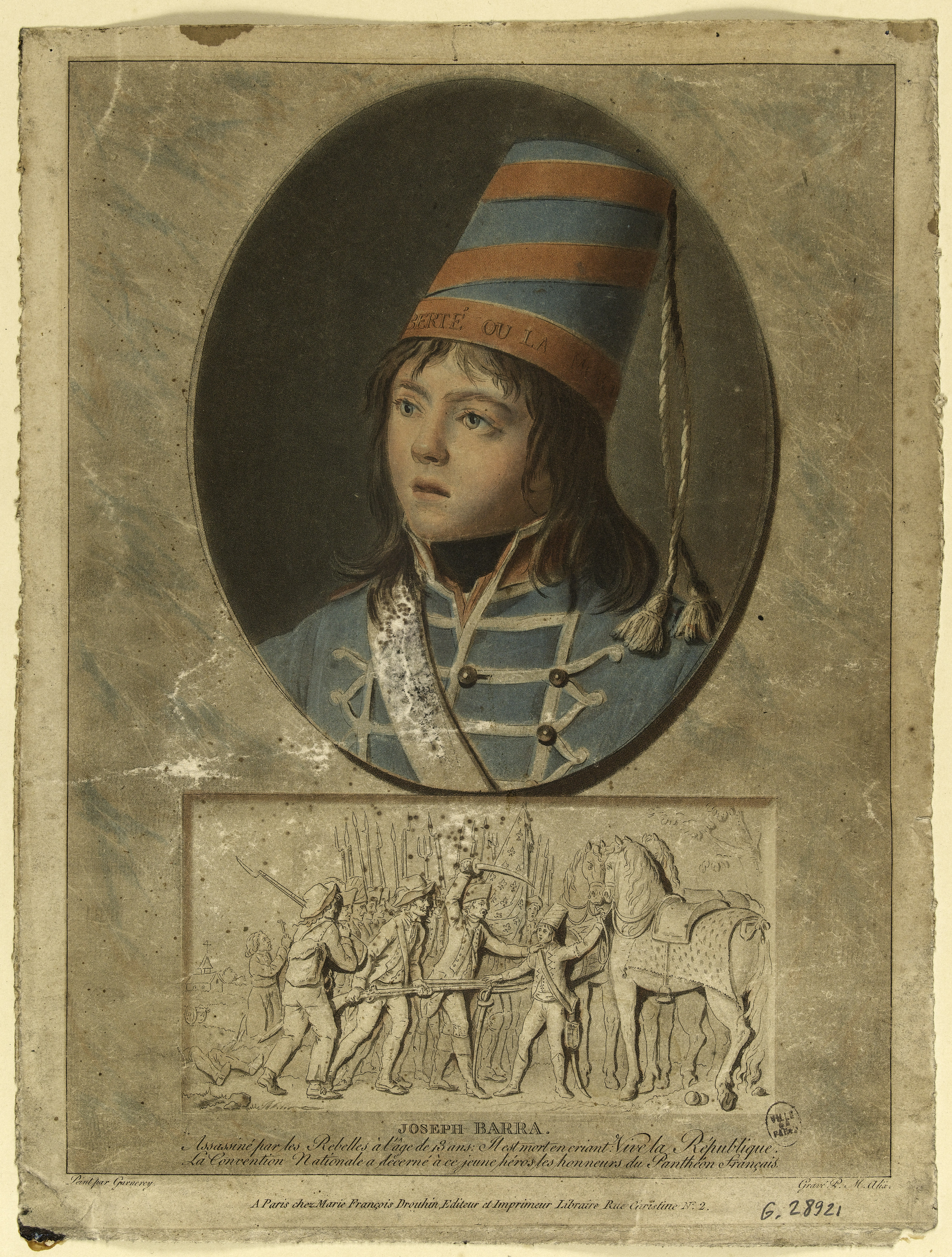 Pierre-Michel Alix (1762–1817): Joseph Barra (Bara) (1779–1793), 1793. Musée du Louvre. Photo (C) RMN-Grand Palais / Michèle Bellot. Randlos.